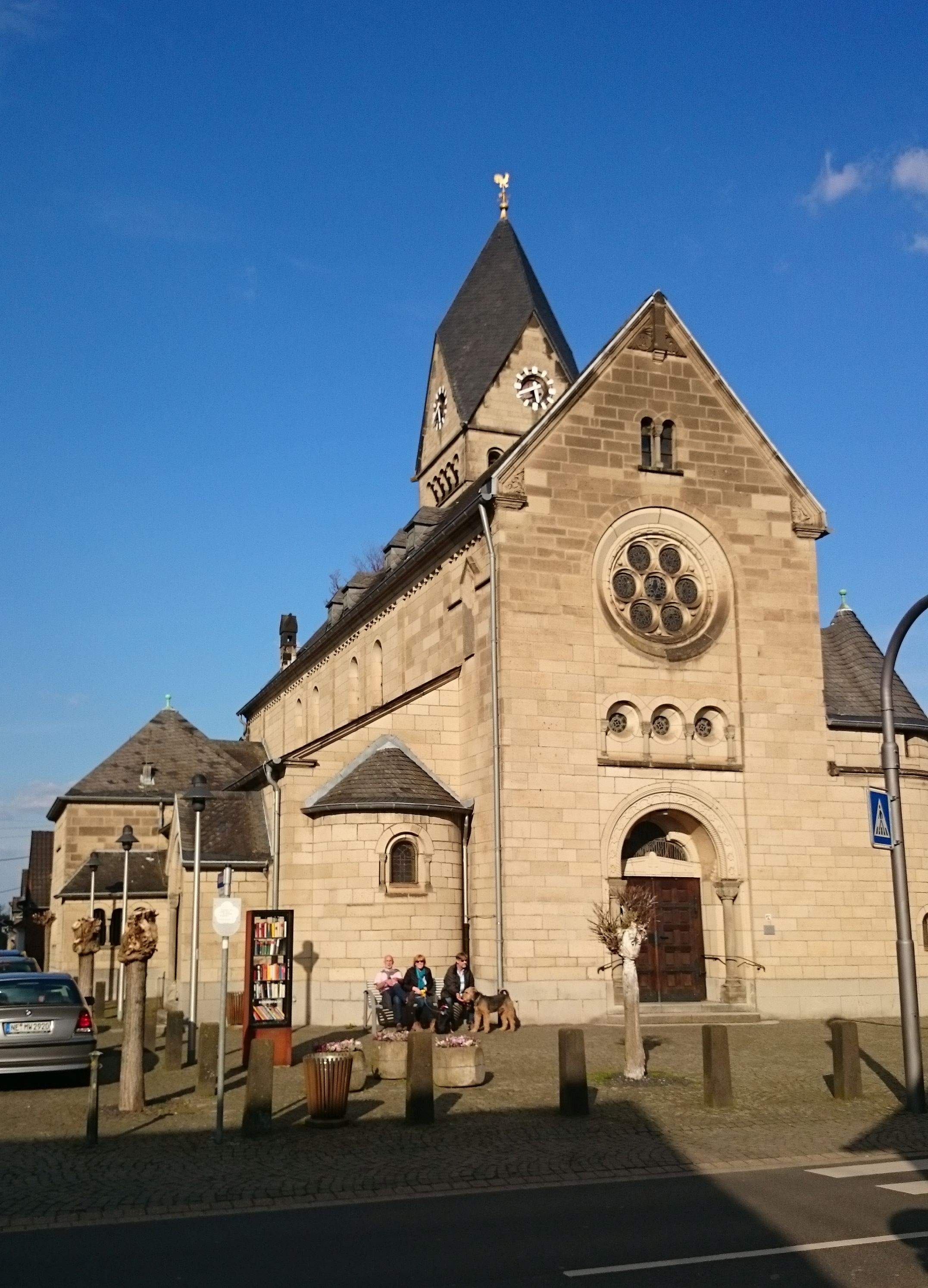 Sebastianuskirche Hülchrath